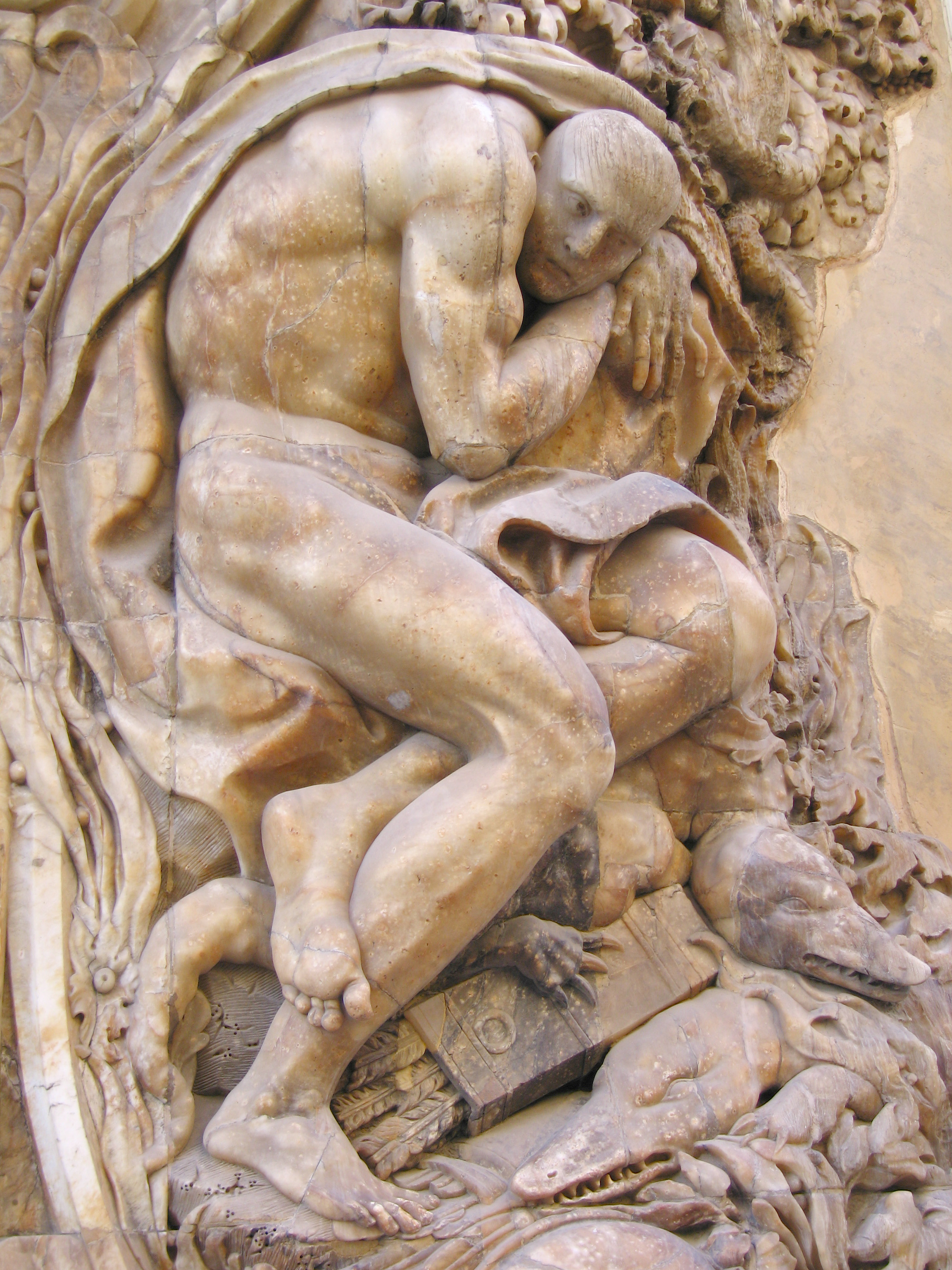 Dosaigües museu Ceràmica (València)